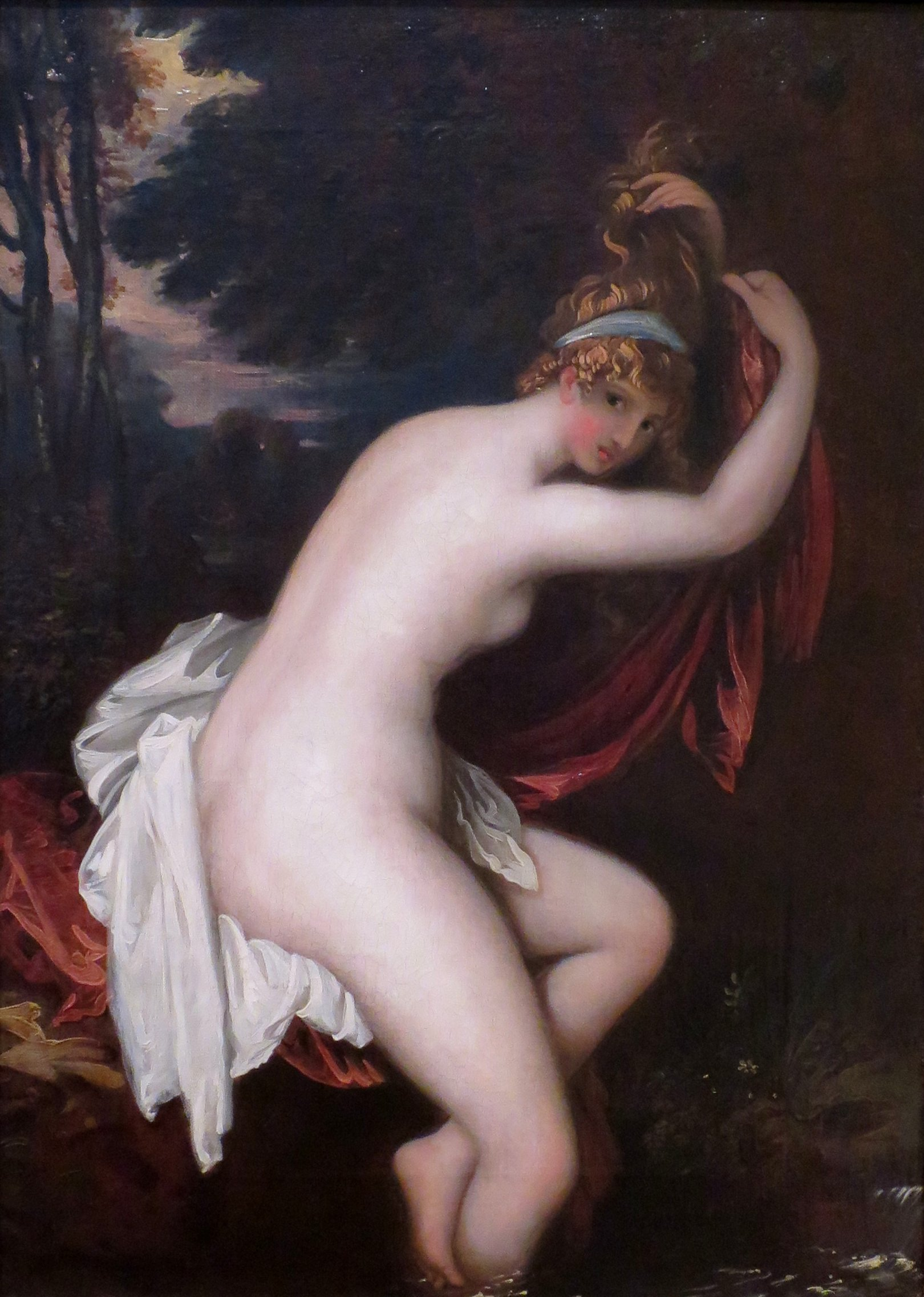 Arethusa